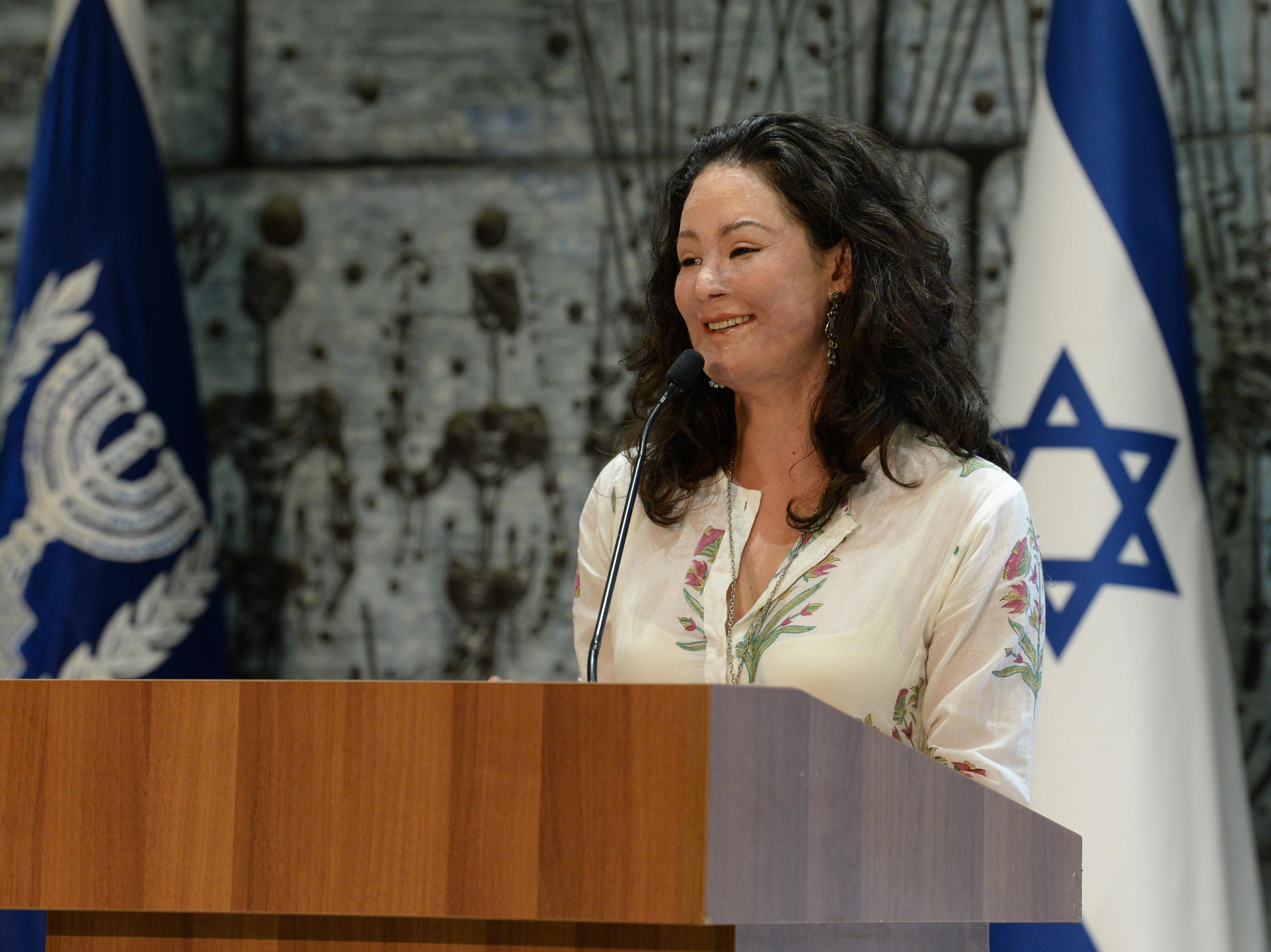 ראובן ריבלין נשיא מדינת ישראל ורעייתו נחמה ריבלין אירחו את כנס נשים מנהיגות ה-30 שמאורגן על ידי מש"ב - המרכז לשיתוף פעולה בינלאומי של משרד החוץ של ישראל. בתמונה: נטליה פונס דה לאון הנציגה מקולומביה